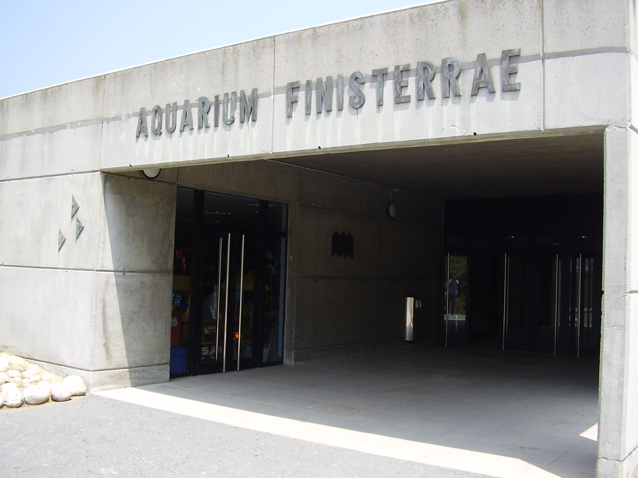 Entrada del Aquarium Finisterrae, en La Coruña